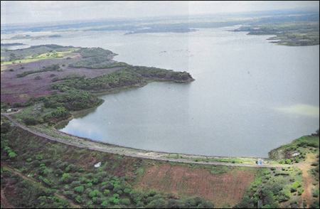 Foto aérea de la presa El Cigarrón en Zaraza.